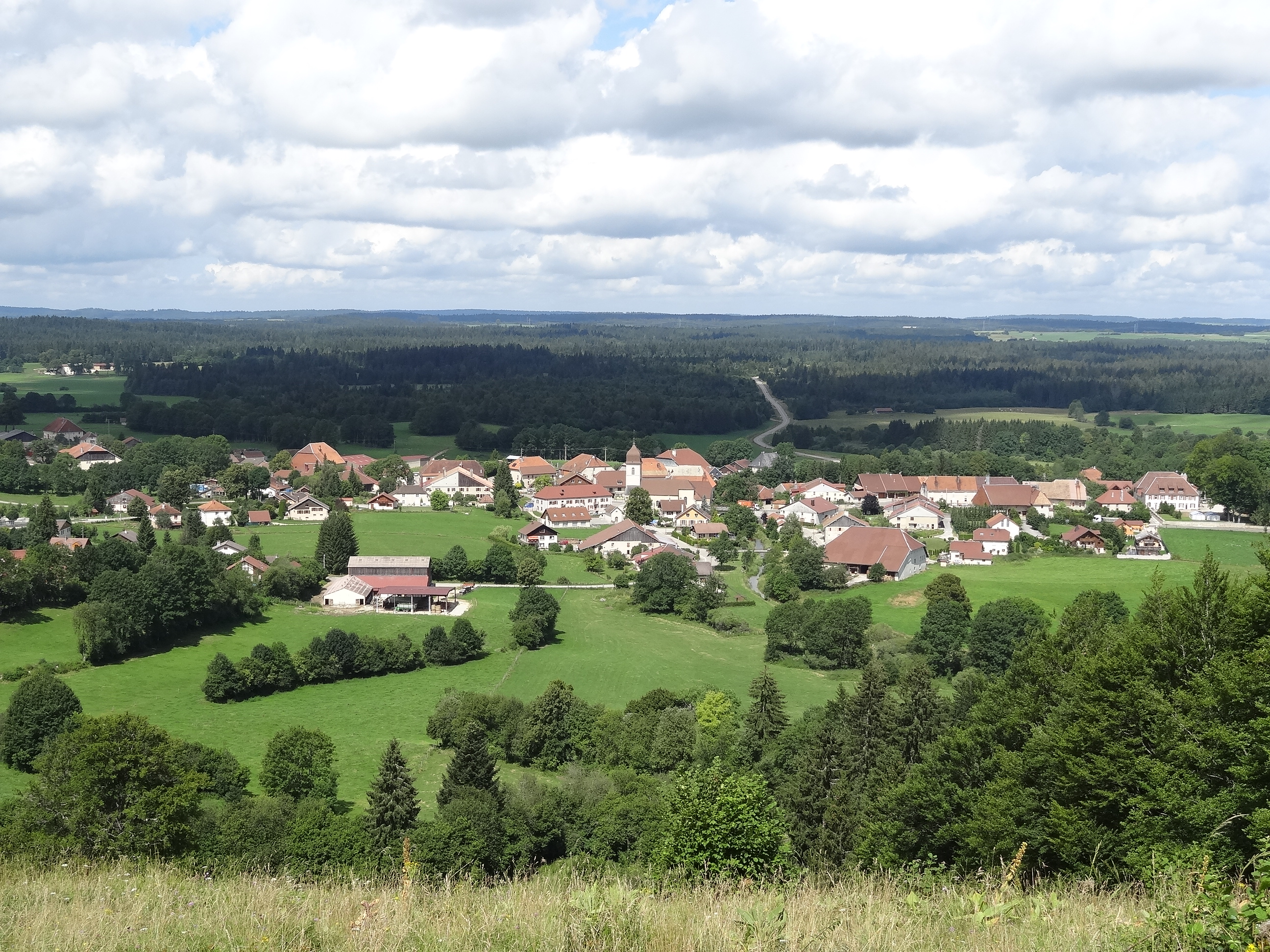 Bonnevaux (Doubs) - vue générale depuis la côte de Bonnevaux en direction du nord-ouest